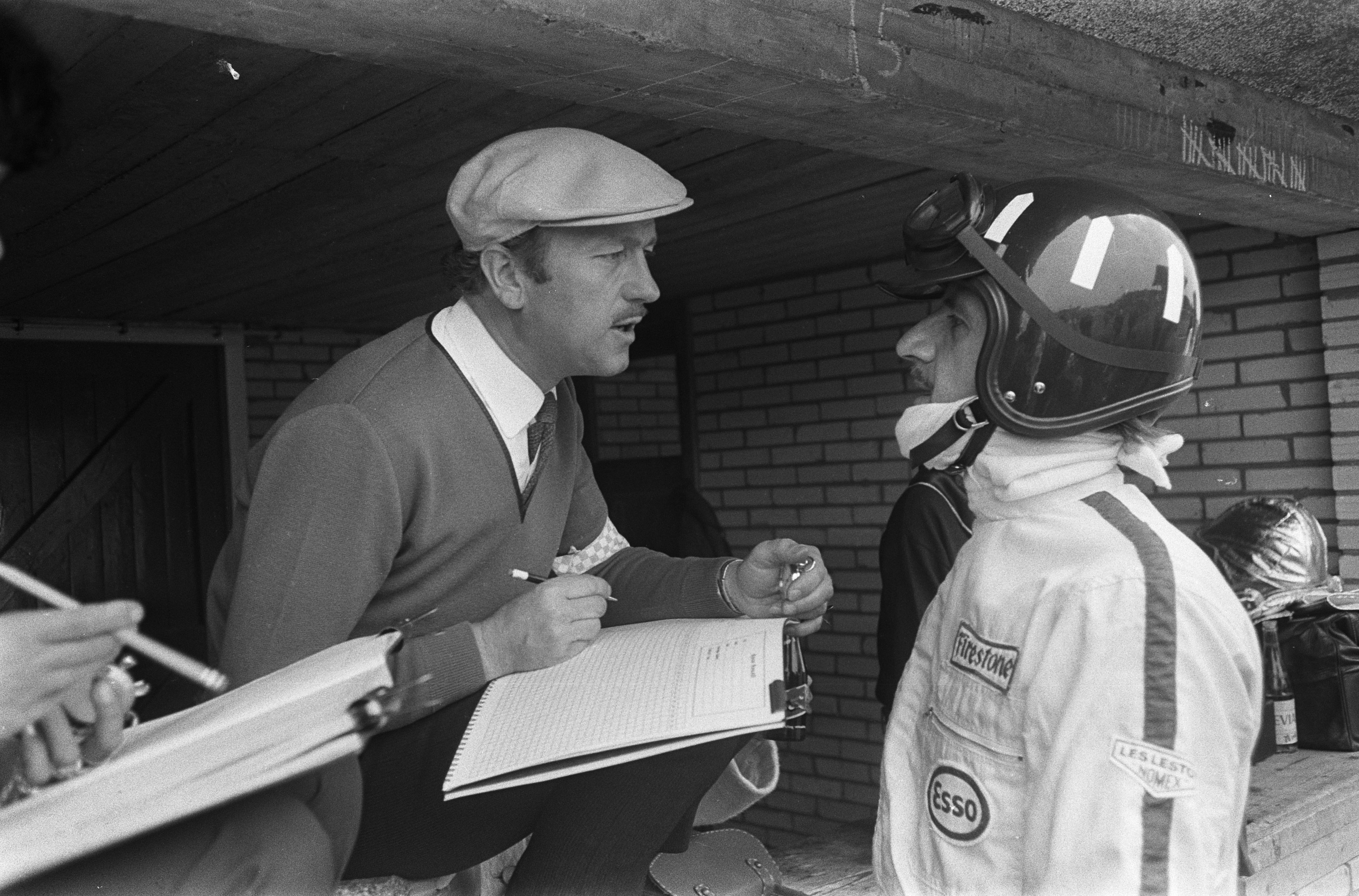 Collectie / Archief : Fotocollectie Anefo Reportage / Serie : [ onbekend ] Beschrijving : Chapman met Graham Hill op Zandvoort Datum : 6 juni 1967 Locatie : Noord-Holland, Zandvoort Persoonsnaam : Chapman, Graham Hill Fotograaf : Koch, Eric / Anefo Auteursrechthebbende : Nationaal Archief Materiaalsoort : Negatief (zwart/wit) Nummer archiefinventaris : bekijk toegang 2.24.01.05 Bestanddeelnummer : 920-3879